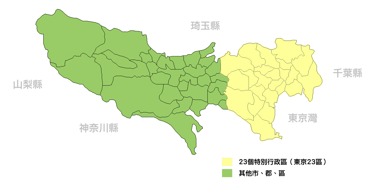 日本東京分區現狀地圖